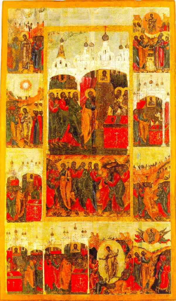 Воспойте Господеви песнь нову (псалом 95) 1668-1669 годы. Москва, Оружейная палата.